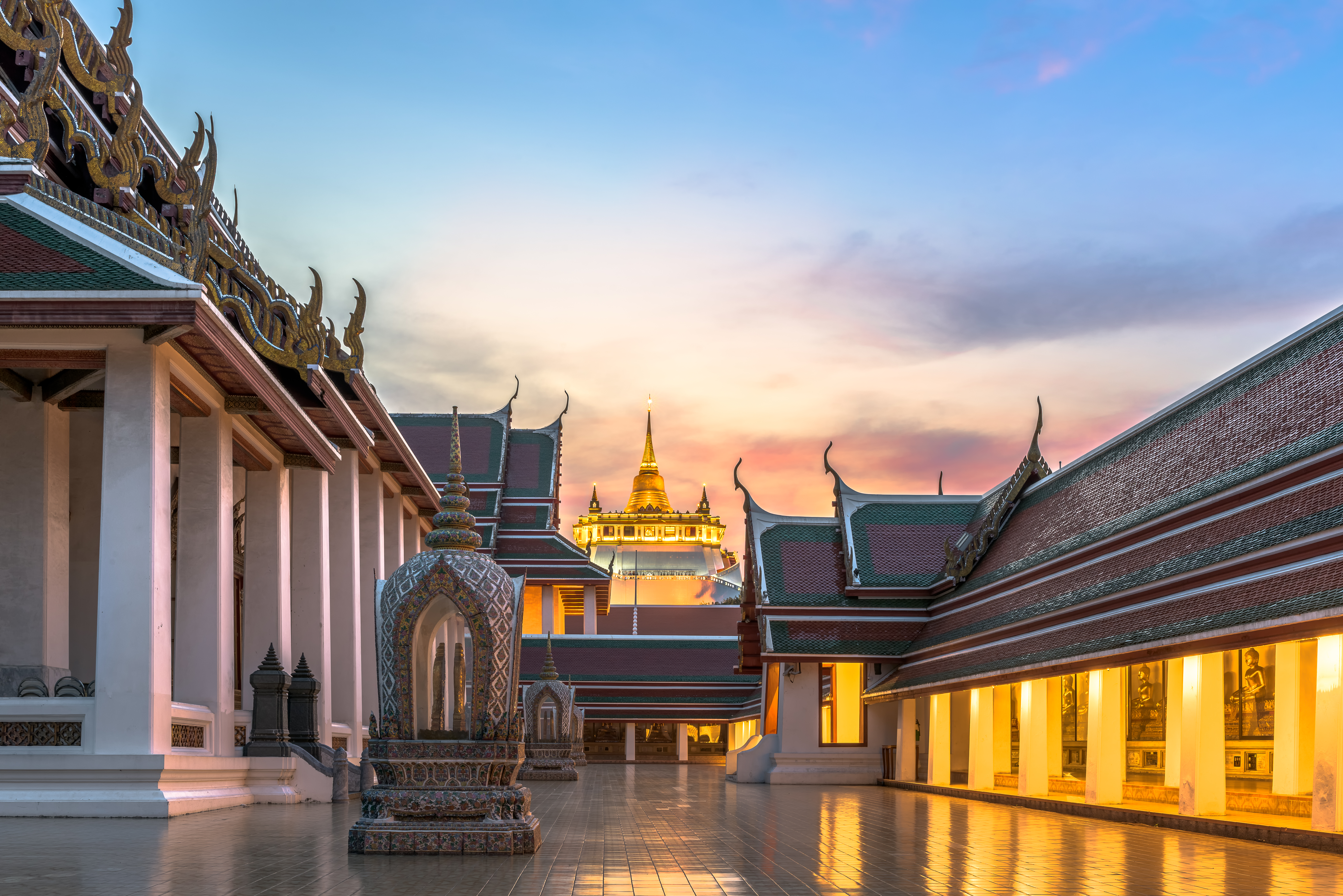 วัดสระเกศ